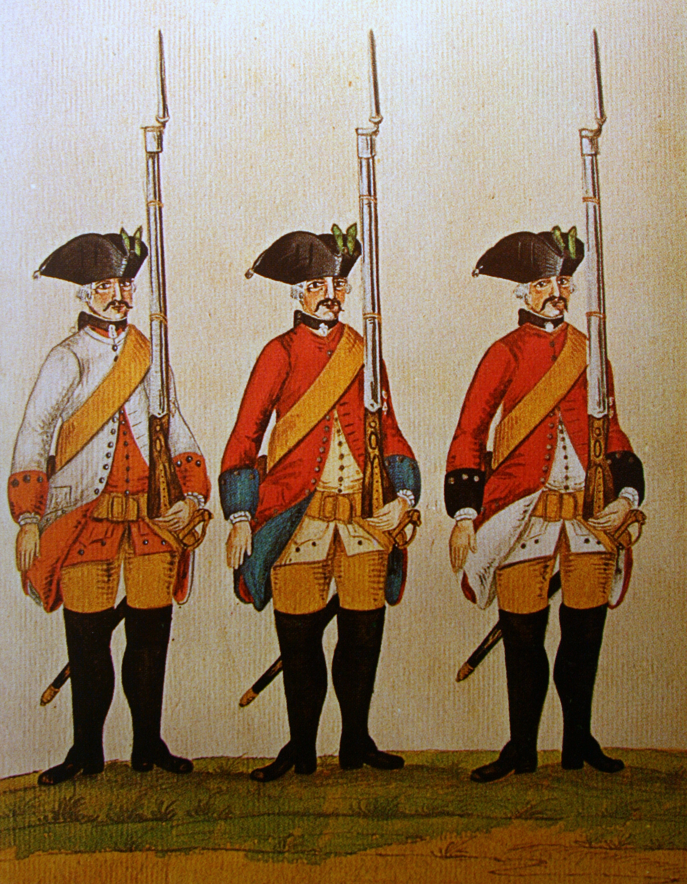 Kurhannoversche Legion Britannique 1761 - III. - V. Bat. der kurhannoverschen Armee während des Siebenjährigen Krieges.